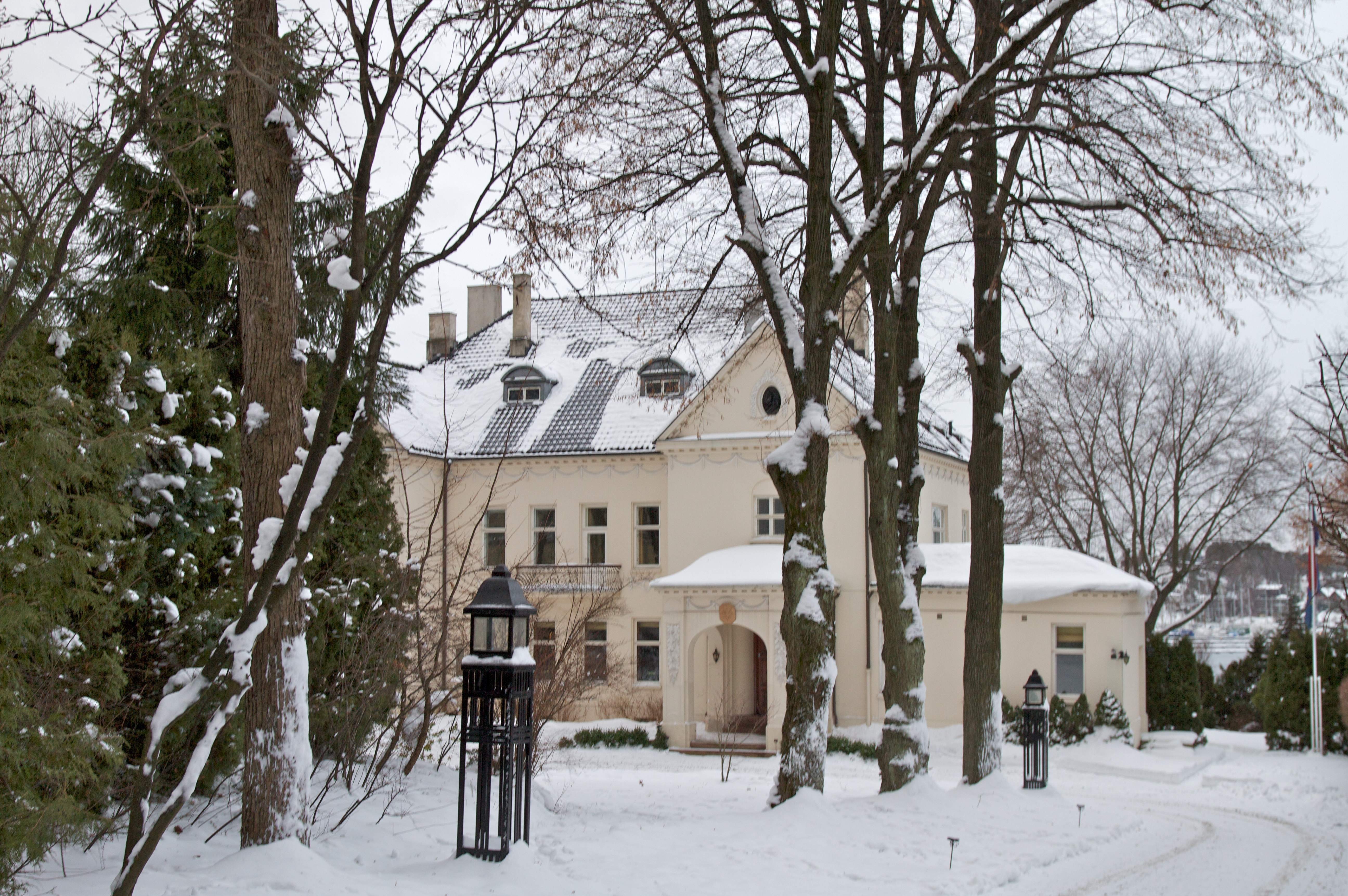 Drammensveien 80 i Oslo.